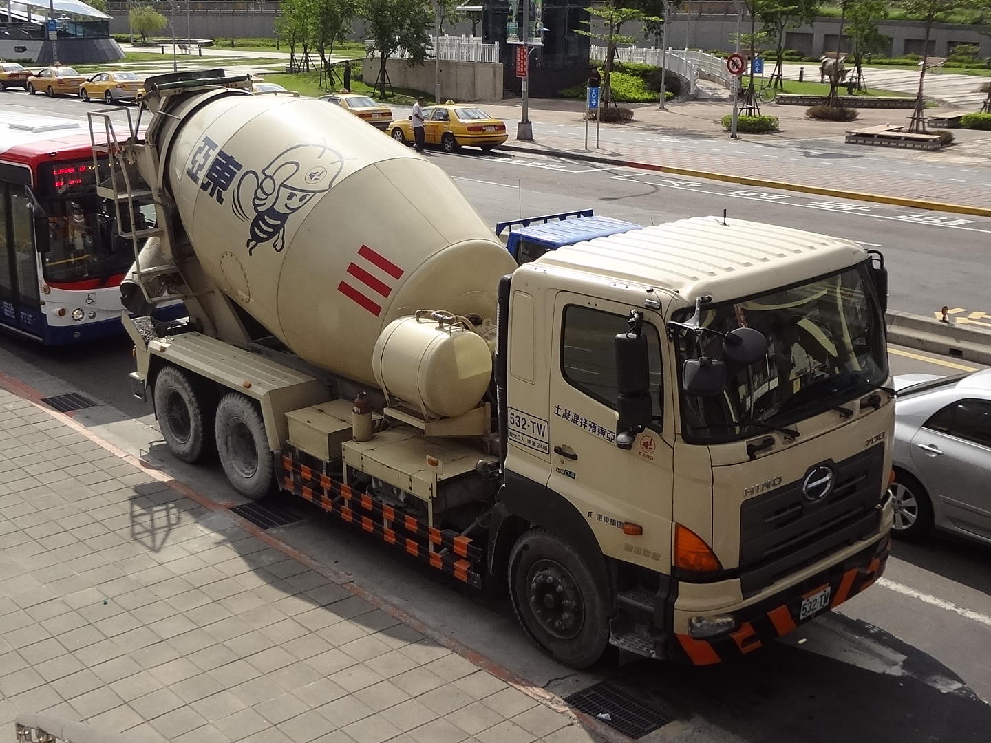 亞東預拌混凝土的日野700水泥預拌車532-TW。